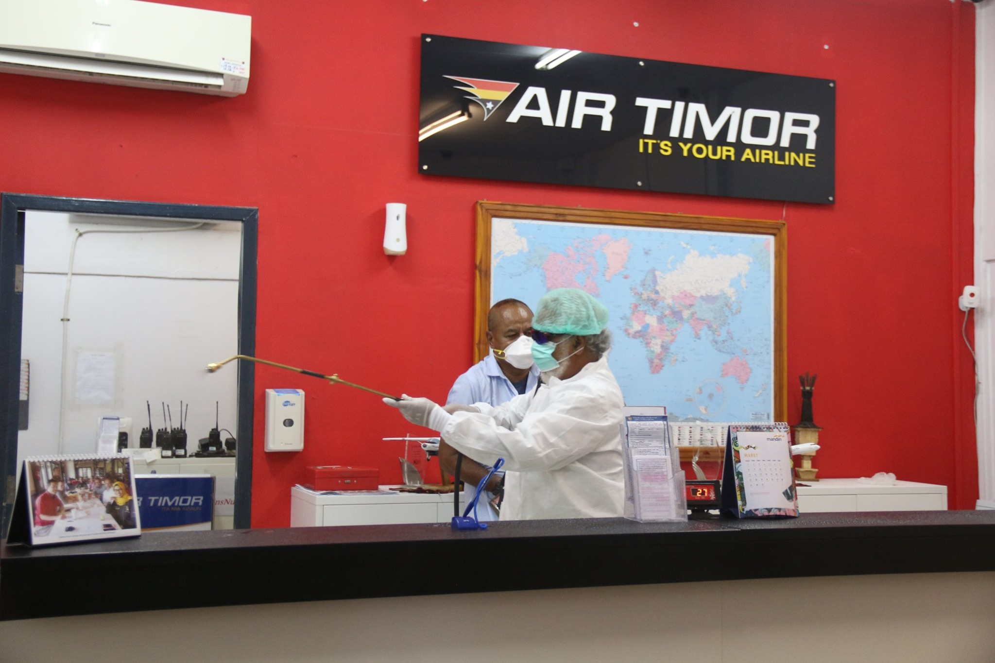 Desinfektionsaktion am Flughafen Dili